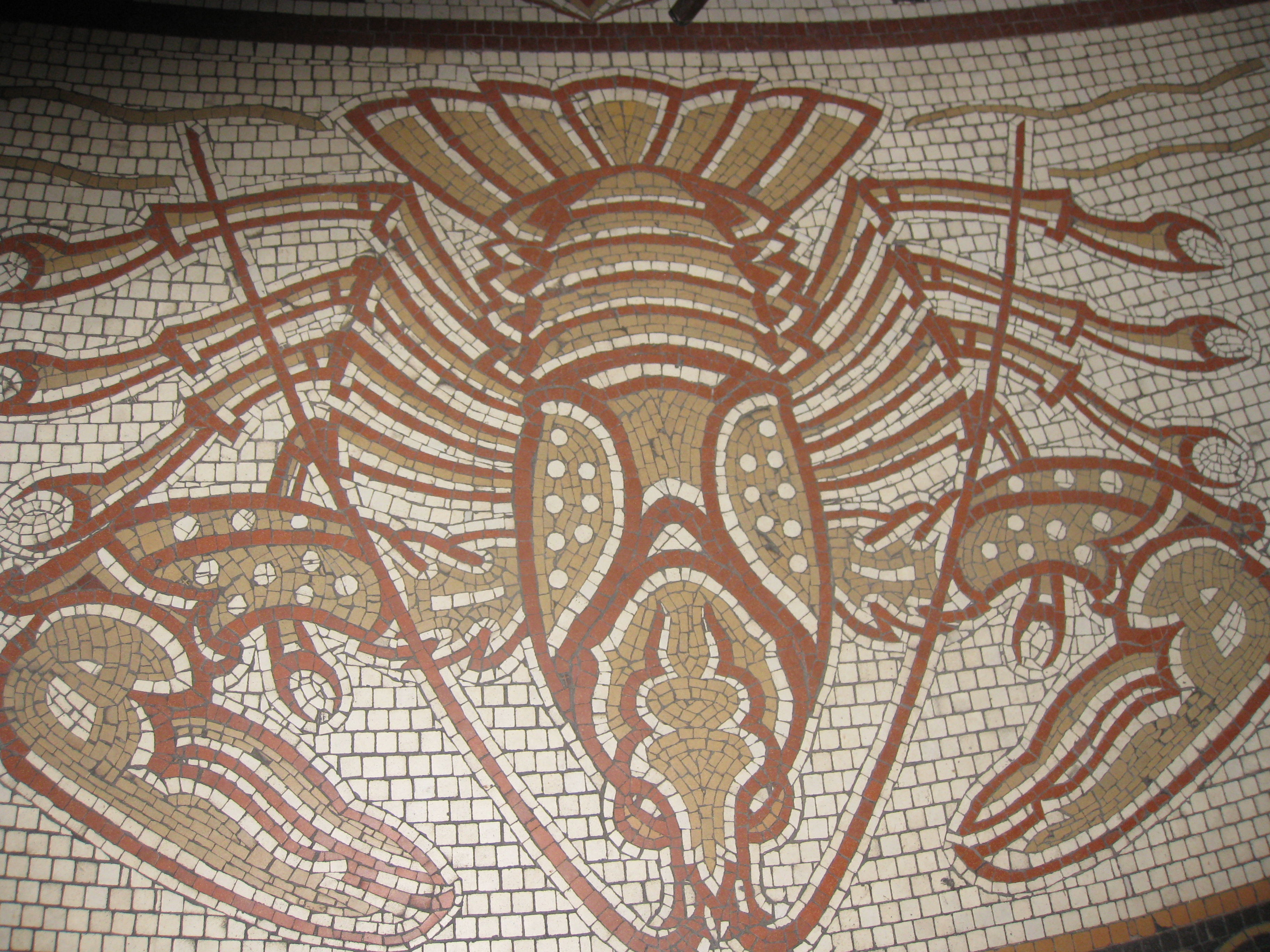 The Dormition Church on Mount Zion in Jerusalem כנסיית הדורמיציון על הר ציון בירושלים